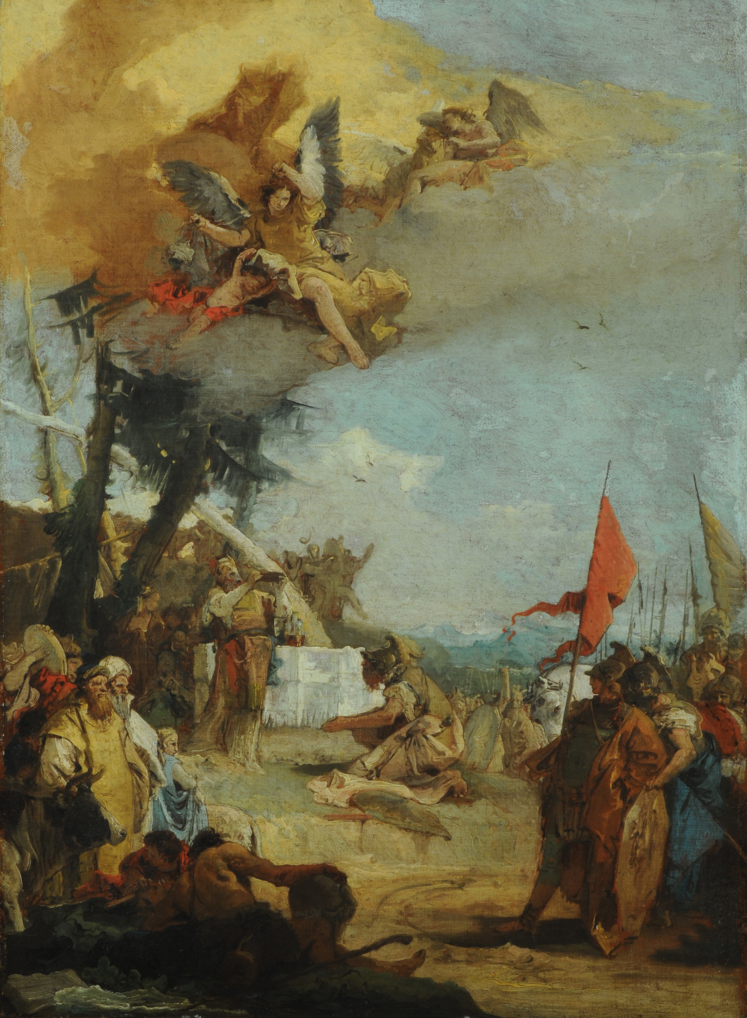 Giovanni Battista Tiépolo, "Sacrificio de Melquisedec", ca. 1740, 91 x 67 cm., Óleo sobre tela, Inv. 2580